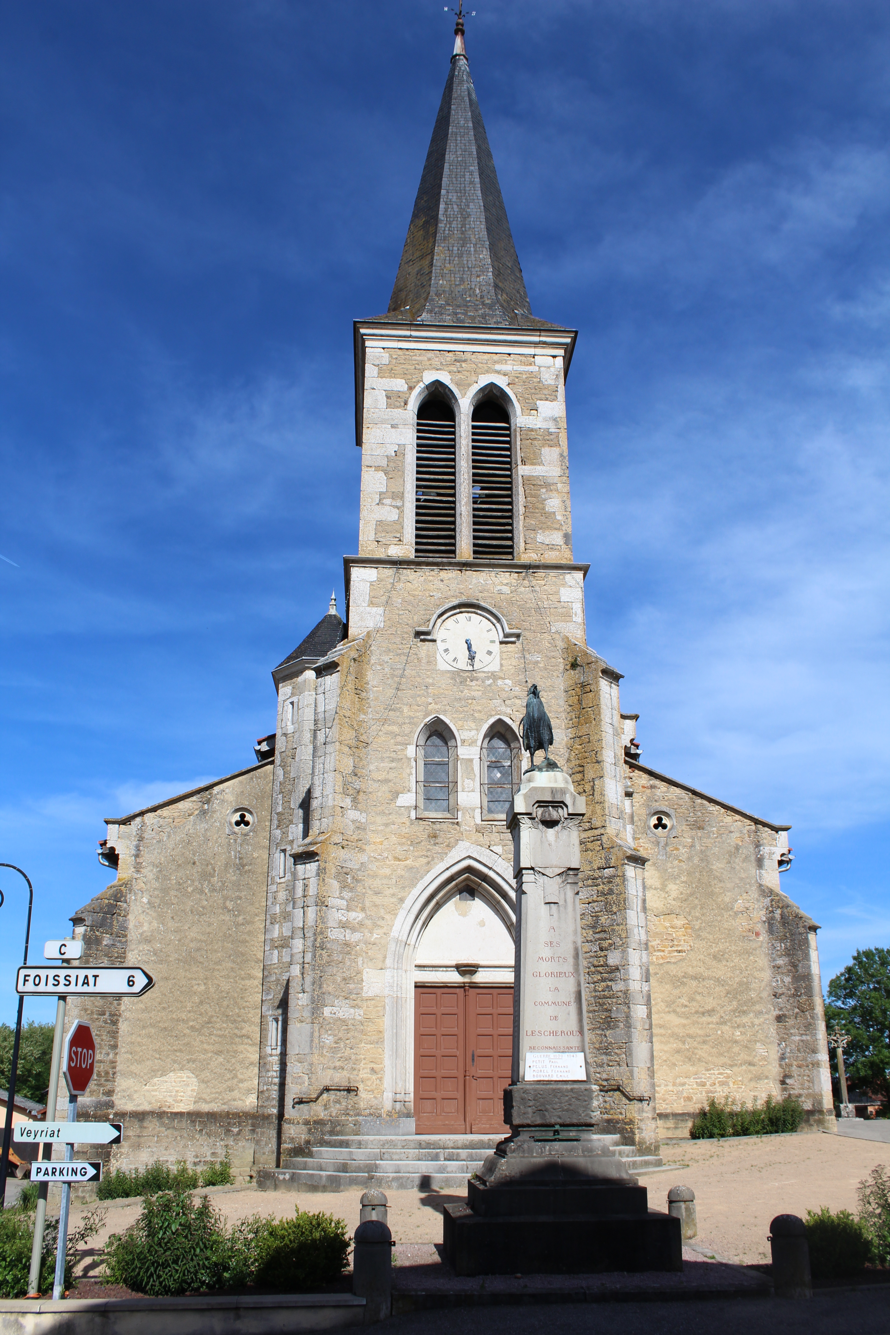 Église Saint-André de Lescheroux.